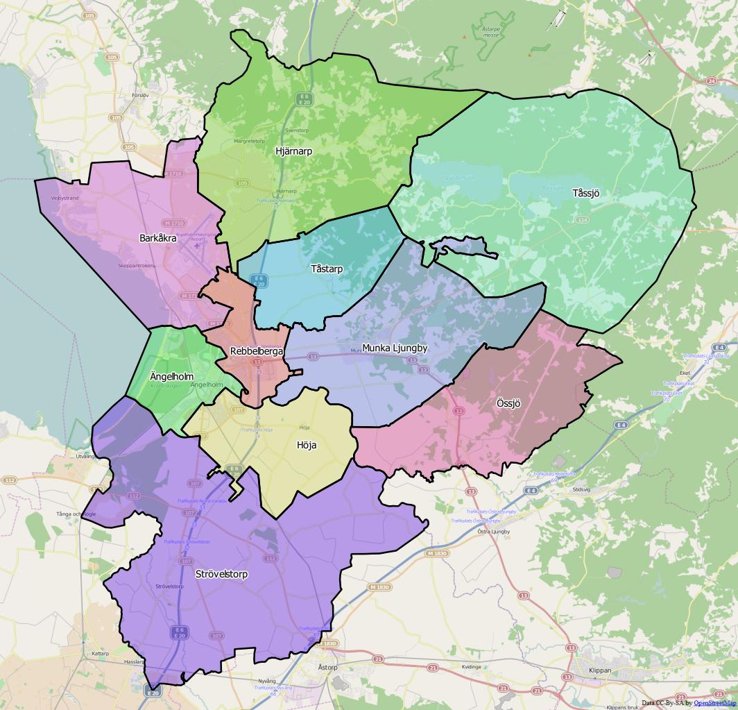 Distriktsindelningen i Ängelholms kommun World file 53.0177564048558807 0 0 -53.0177564048558807 1416147.96221801941283047 7636316.27743839006870985